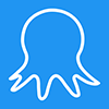 Octoparse公式ロゴマーク